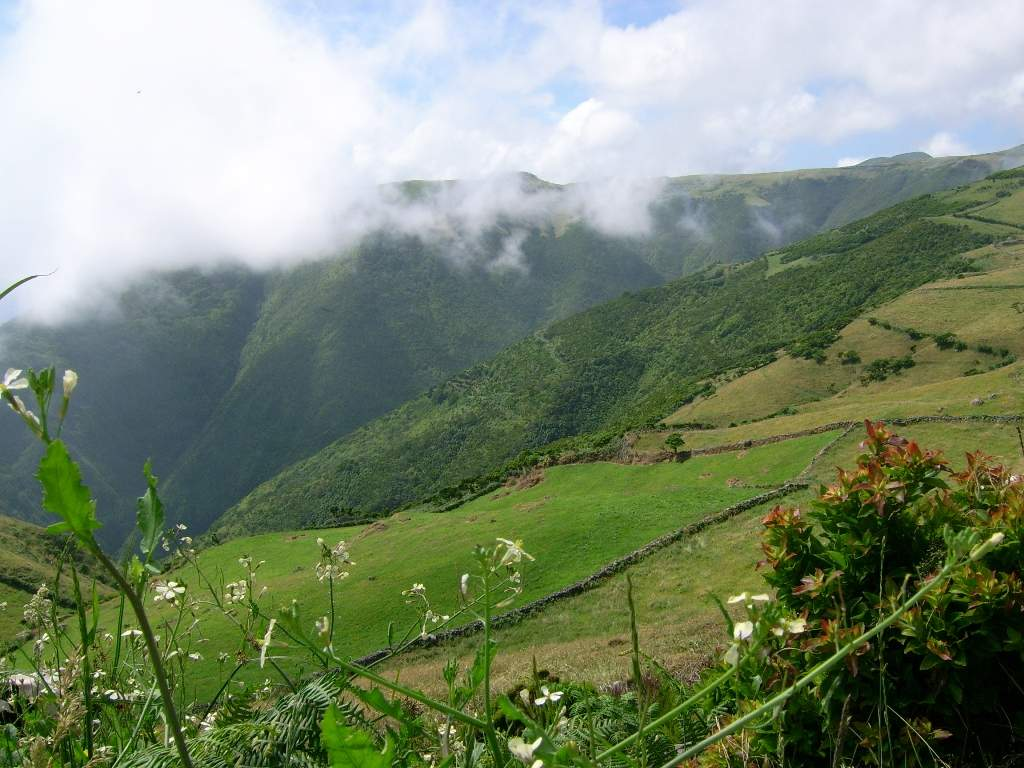 Serra do Topo, Complexo Vulcânico do Topo, ilha de São Jorge, Açores, Portugal